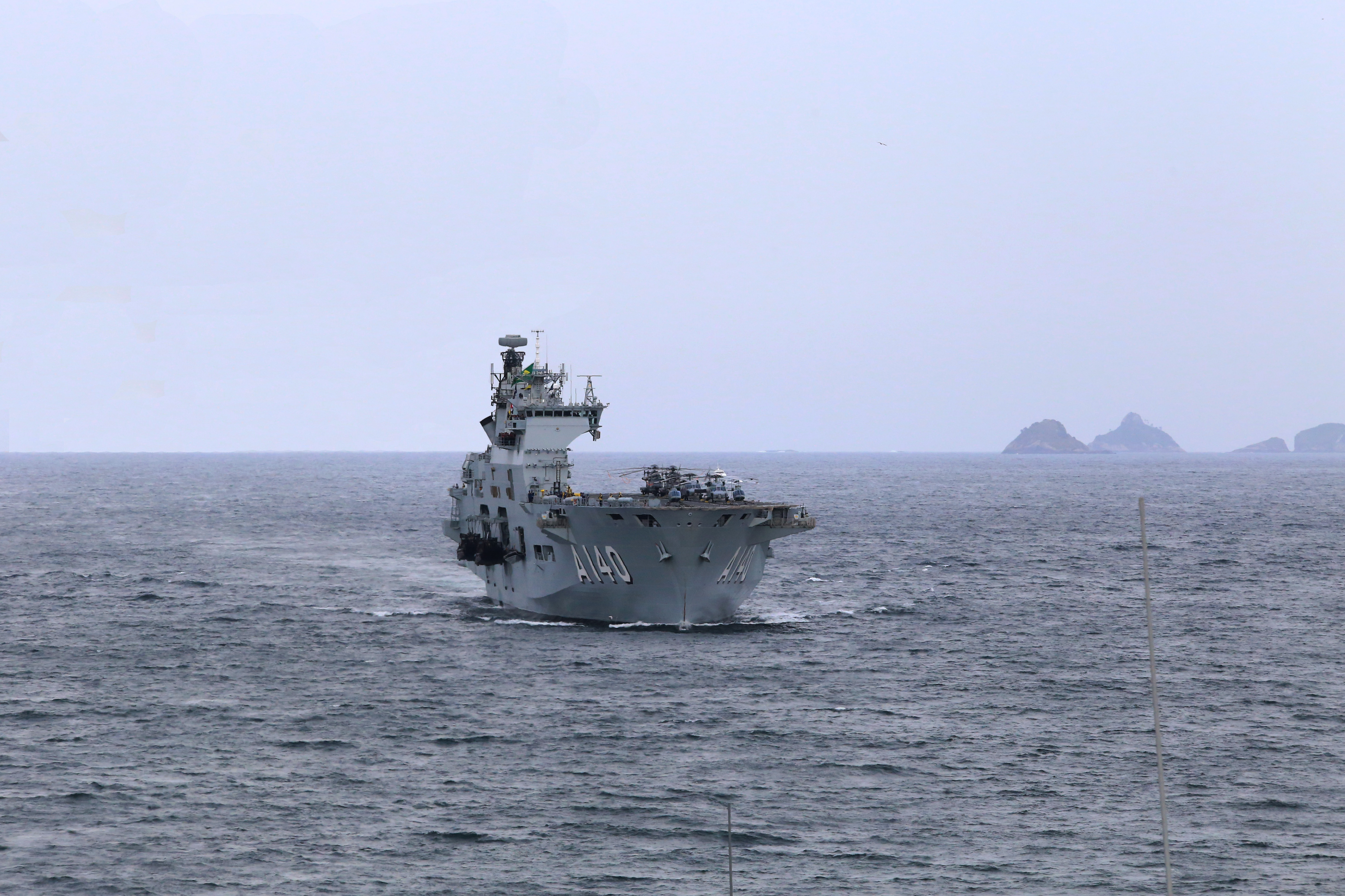 Crédito: Marinha do Brasil Arquivo liberado pela Marinha do Brasil através de projeto GLAM com Wiki Educação Brasil